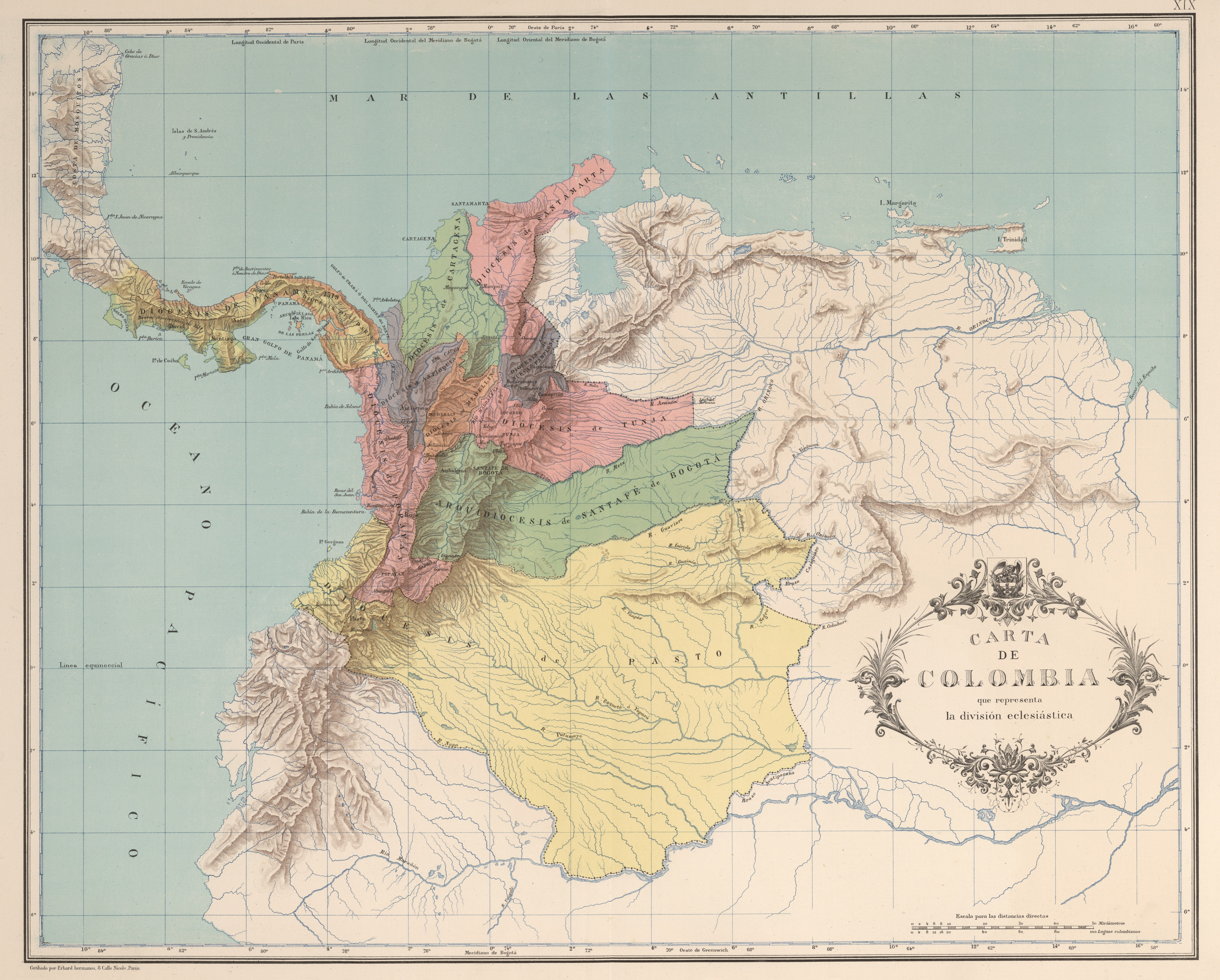 Carta que representa la división eclesiástica de Colombia. Carta XIX del Atlas geográfico e histórico de la República de Colombia, 1890.